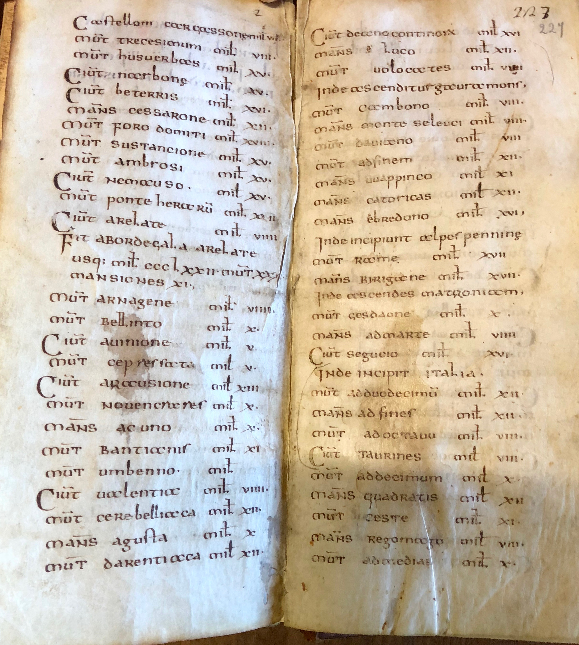 Copie du manuscrit conservé à la Bibliothèque Capitulaire de Vérone, elle reprend pour partie les étapes des manuscrit de la BnF